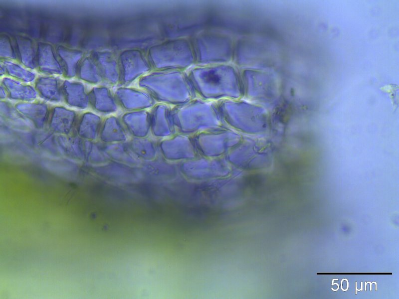 Zypressen-Schlafmoos (Hypnum cupressiforme), Blattflügelzellen, etwa 400x vergr.